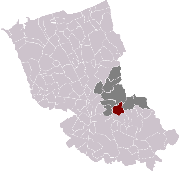 Locatie gemeente Eke in arrondissement Duinkerke. Zelfgemaakt. Location of Eecke municipality in the arrondissement of Dunkirk. Self made. Localisation de la commune d'Eecke dans l'arrondissement de Dunkerque. Fait moi-même.